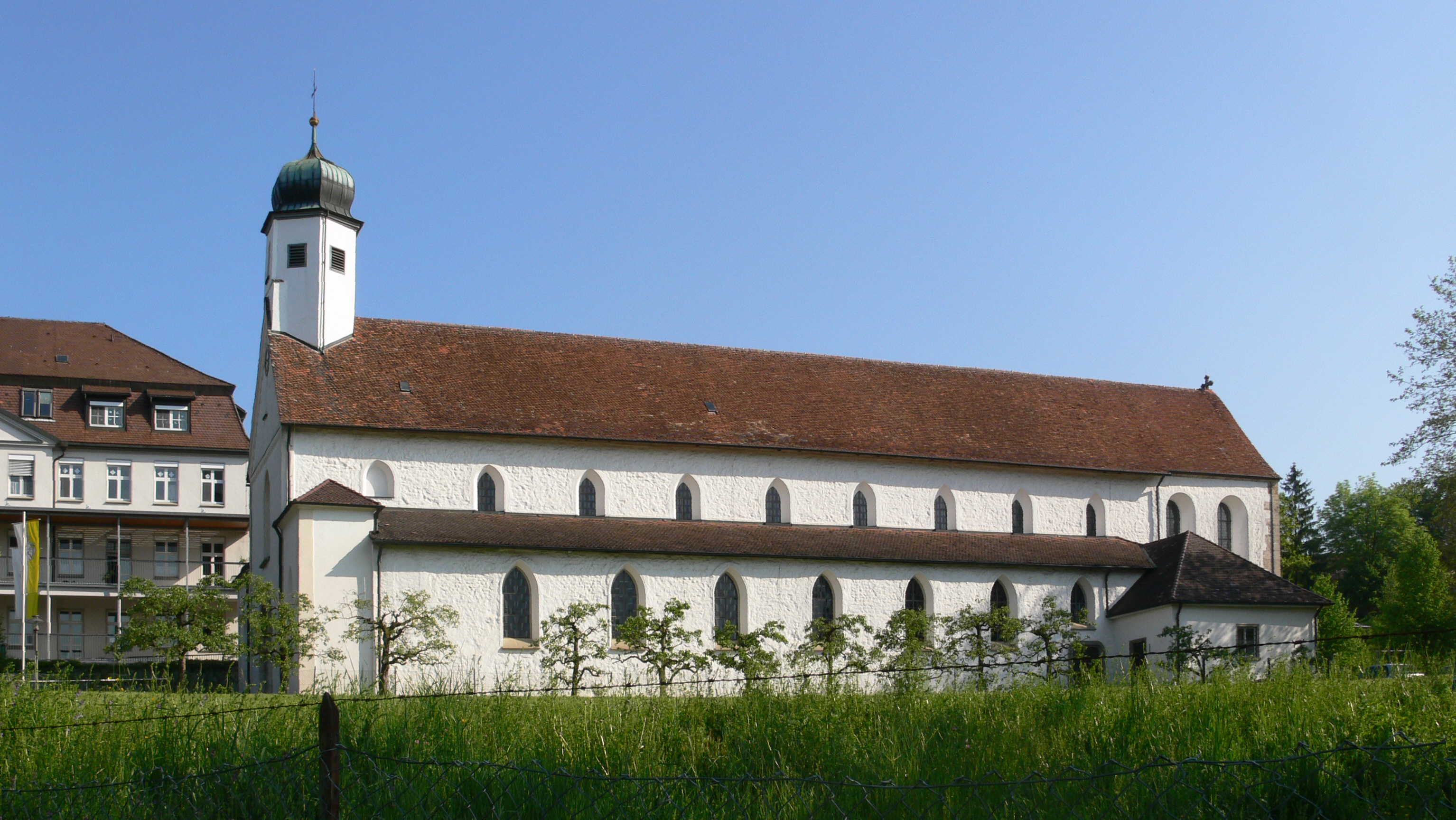 Pfarrkirche St. Johannes Baptist (ehem. Klosterkirche Unserer Lieben Frau), Baindt, Landkreis Ravensburg